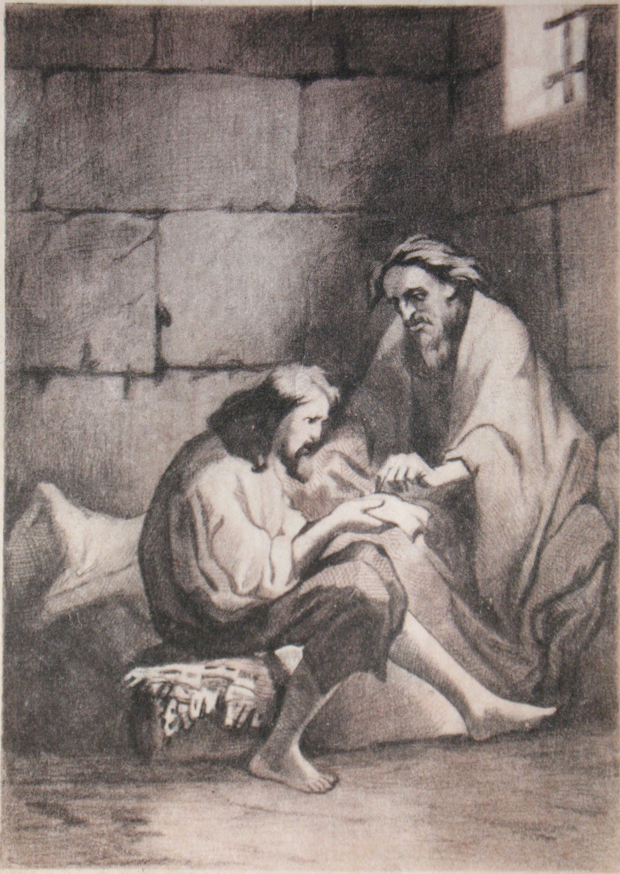 Tony Johannot picture pour Monte Cristo d'Alexandre Dumas. Тони Жоанно. Эдмон Дантес и аббат Фариа читают завещание кардинала Спада в замке Иф между 1824 и 1828 годами. Рисунок из прижизненного издания романа 1846-52 г., репродуцированный в московском издании.